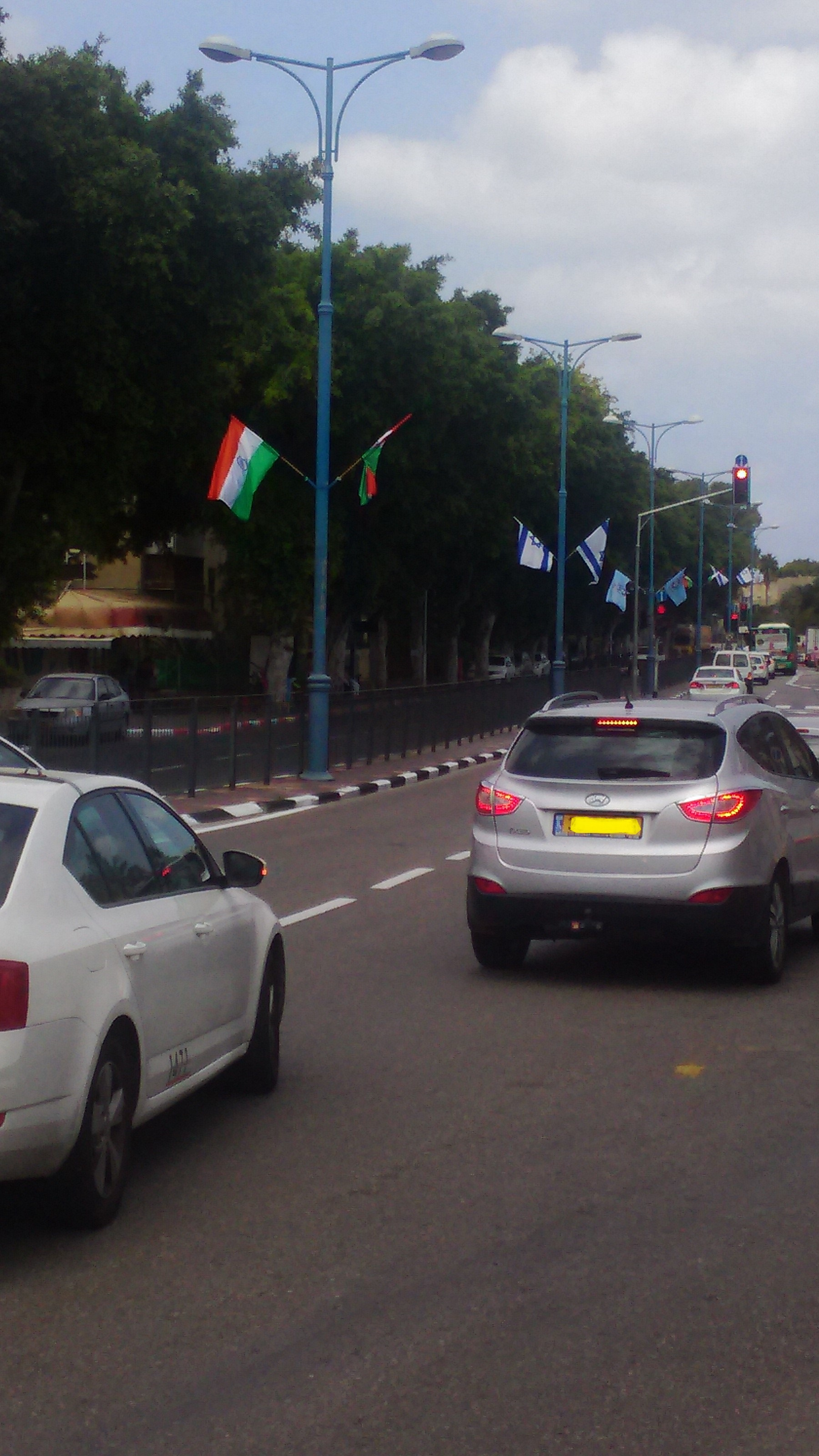 דגלי ישראל והודו מונפים בחיפה, בעת ביקור ראש ממשלת הודו בעיר